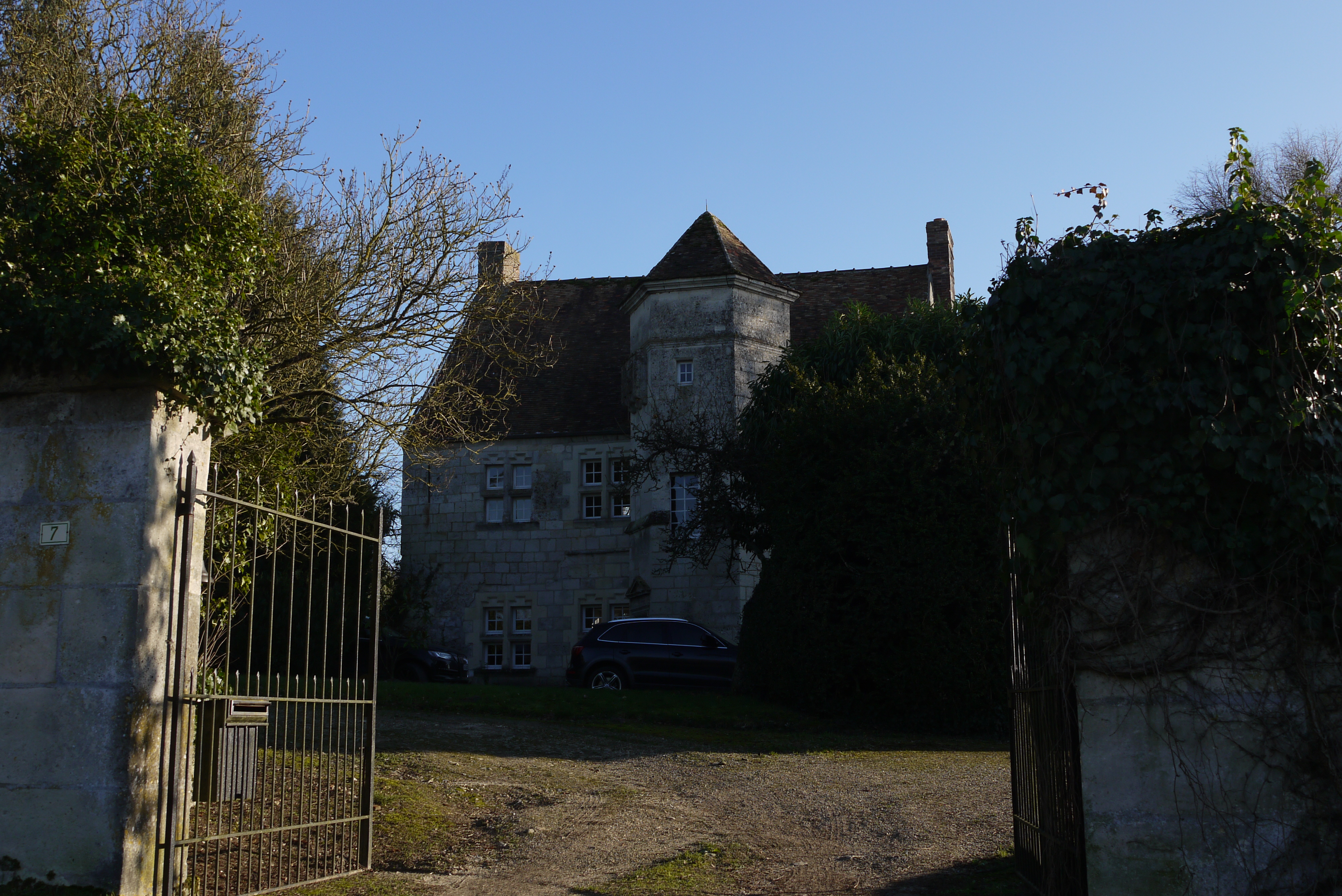 Manoir de Louâtre (Aisne)